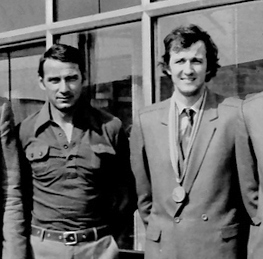 Dinamo - De la stanga la dreapta: William Schreiber, Corneliu Oros, sase voleibalisti de la Dinamo de valoare internationala